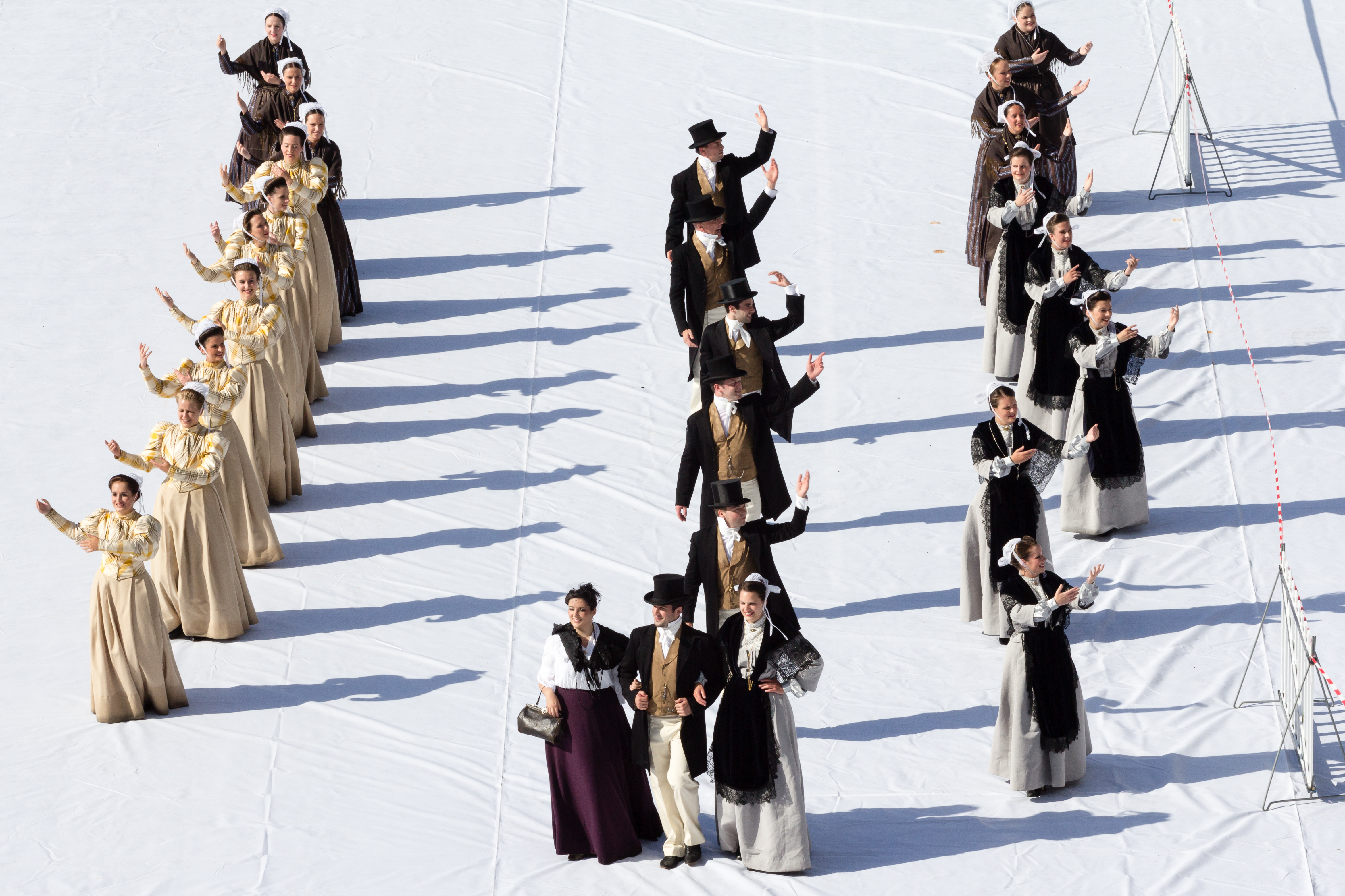 FIL 2012 - Arrivée de la grande parade des nations celtes - Kevrenn Quic-en-Groigne